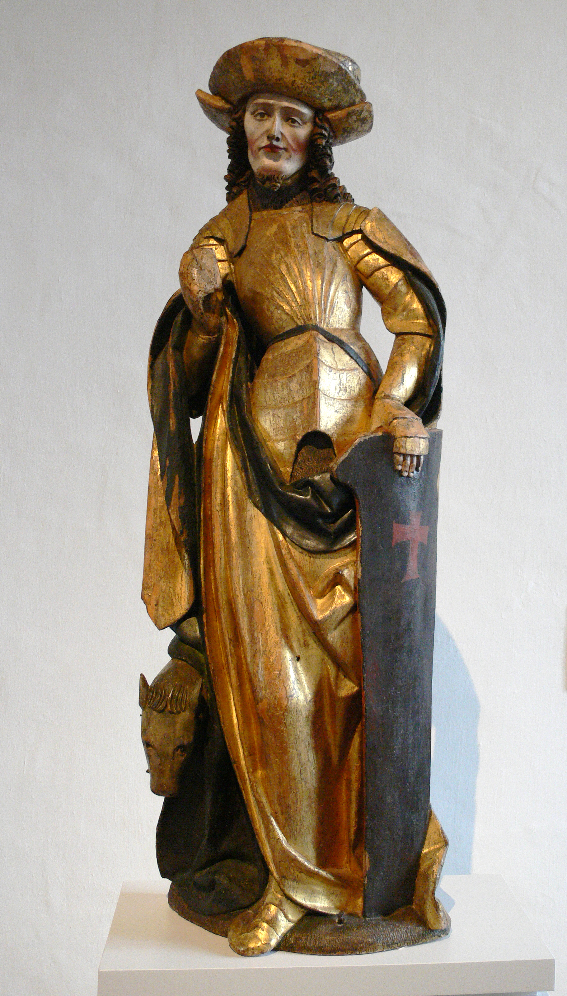 Hl. Hippolytus, aus Tellschütz (Stadt Zwenkau) bei Leipzig, Lindenholz mit originaler Fassung, vermutlich aus einer Altenberger Werkstatt, um 1515 Staatliche Kunstsammlungen Dresden, Skulpturensammlung, SAV 2677a2 (ausgestellt im Schloßbergmuseum Chemnitz)